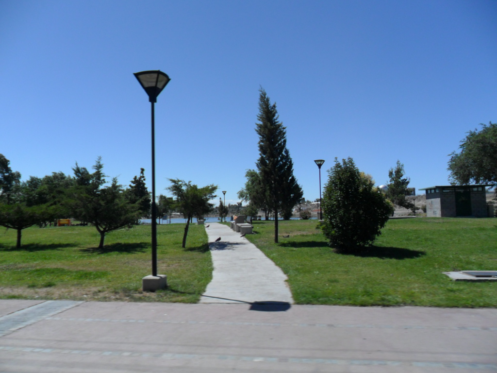 Vista de los alrededores de la Laguna Casique Chiquichano en Trelew.